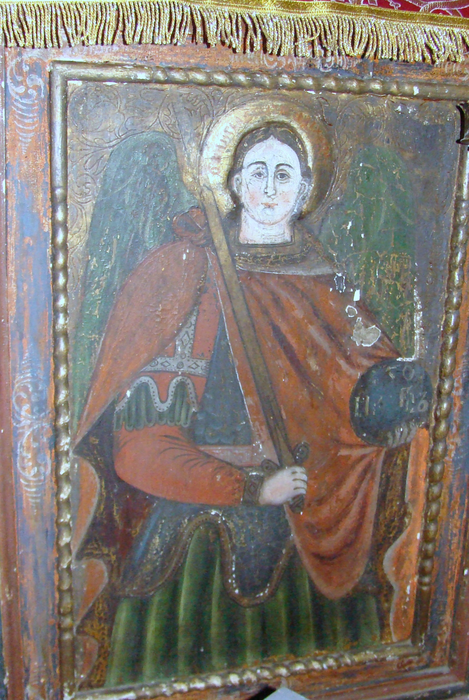 Biserica de lemn „Sfinții Arhangheli Mihail și Gavriil” din Sic, comuna Sic, județul Cluj